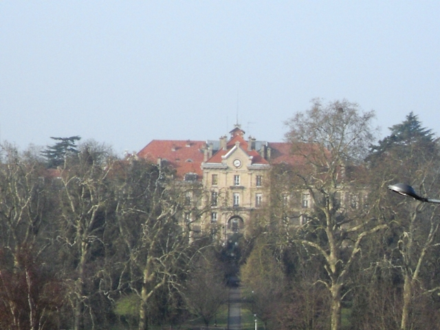 Le bâtiment principal de l'hôpital Perray-Vaucluse à Epinay-sur-Orge (91)